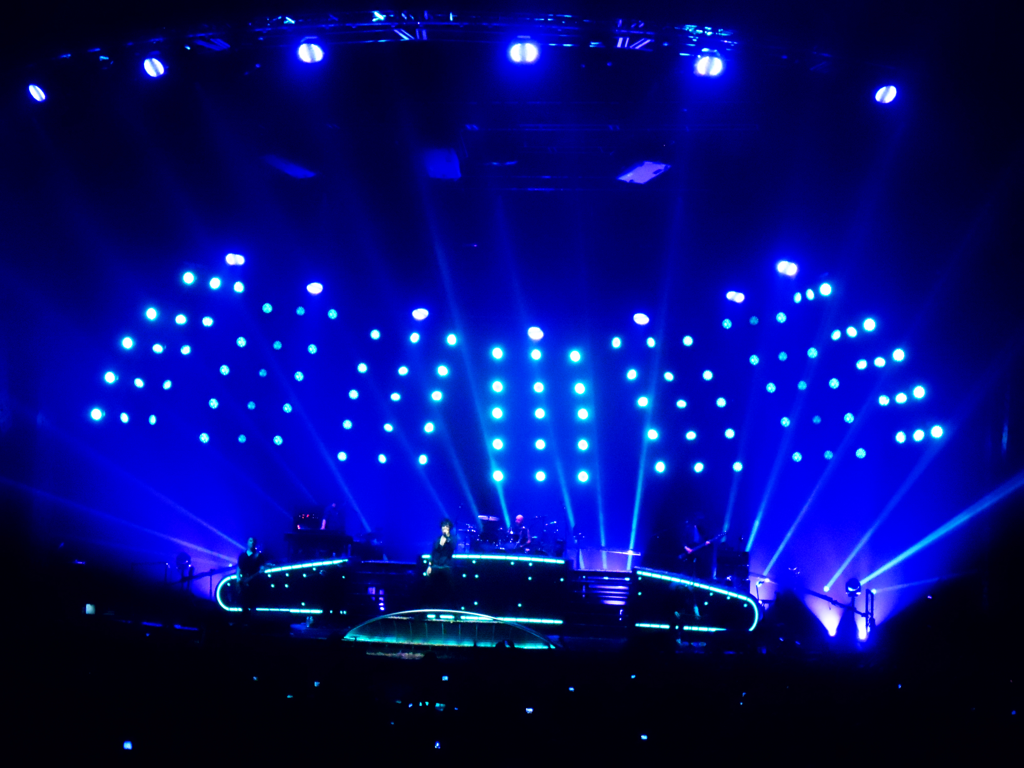 Indochine au Zénith de Nantes en 2013.